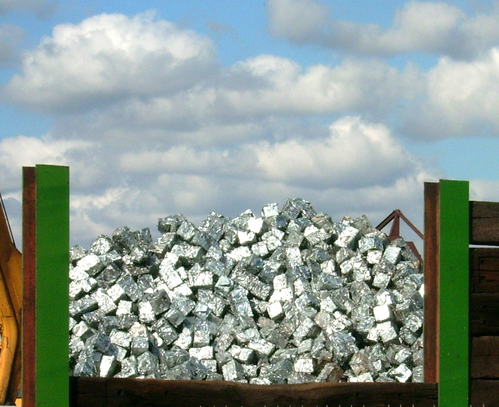 Aluminum scrap